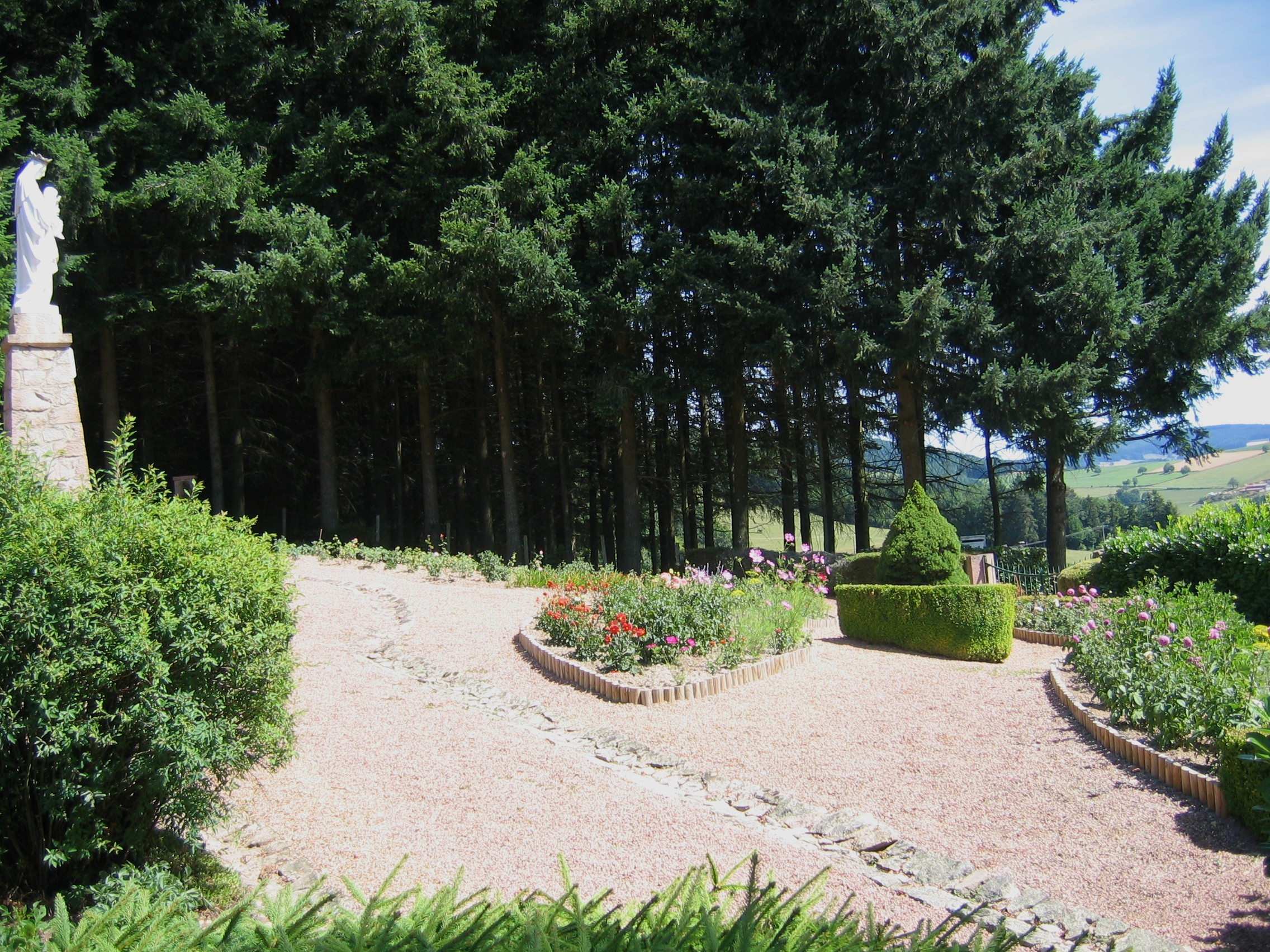 la madone des pins dorées fut bâtie en 1902. Depuis, elle veille sur les 200 âmes du village de la Chapelle de Mardore (Rhône).